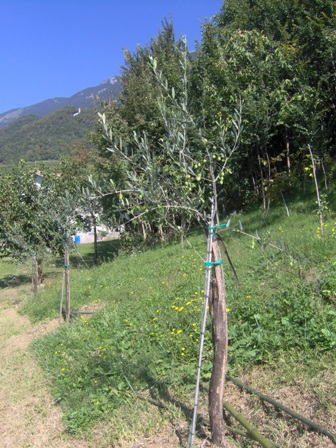 Olivo con frutti cui dietro si può notare il colle di San Daniele, con l'omonima chiesetta, che sovrasta Osigo